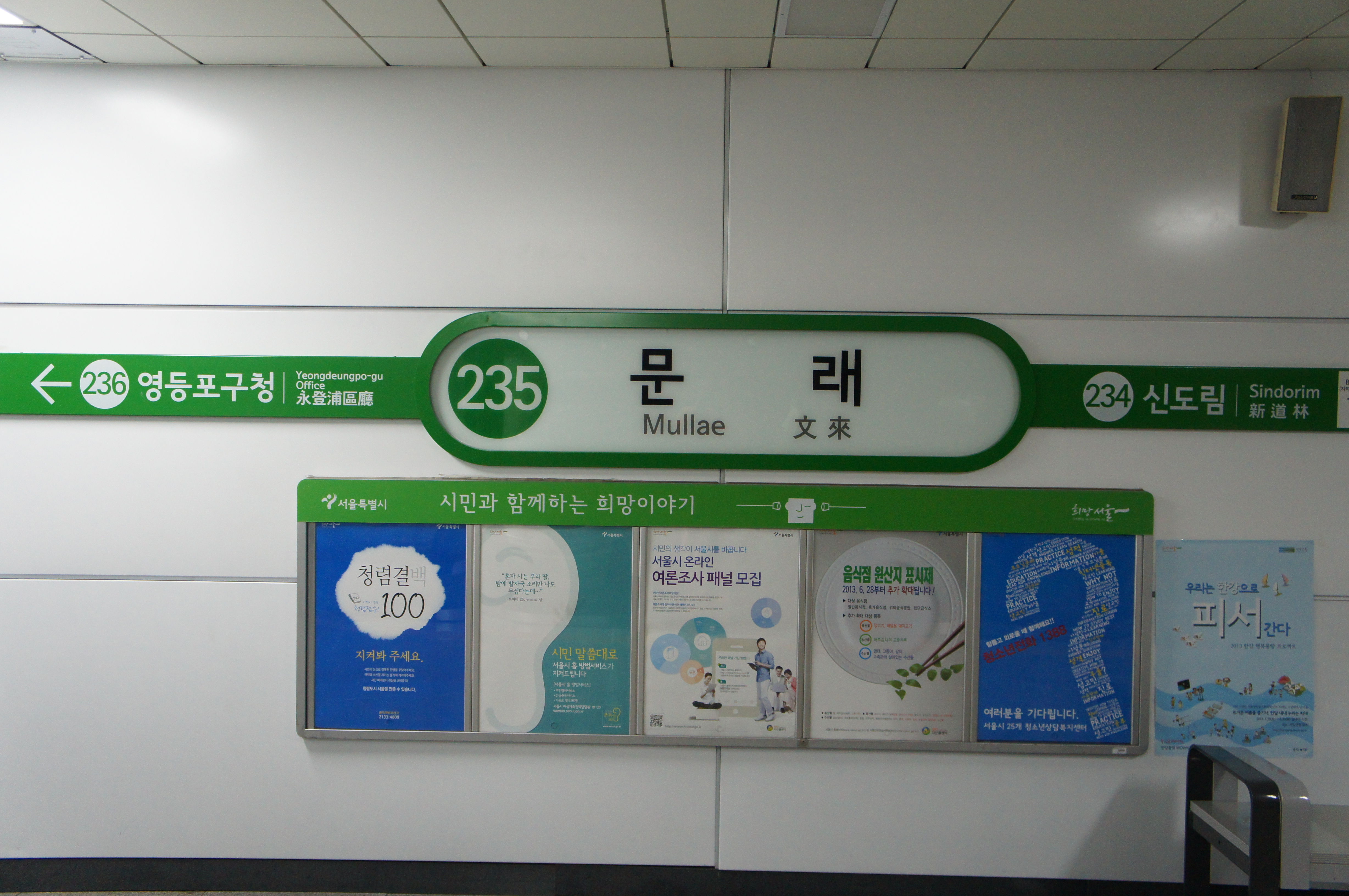 문래역 역명판